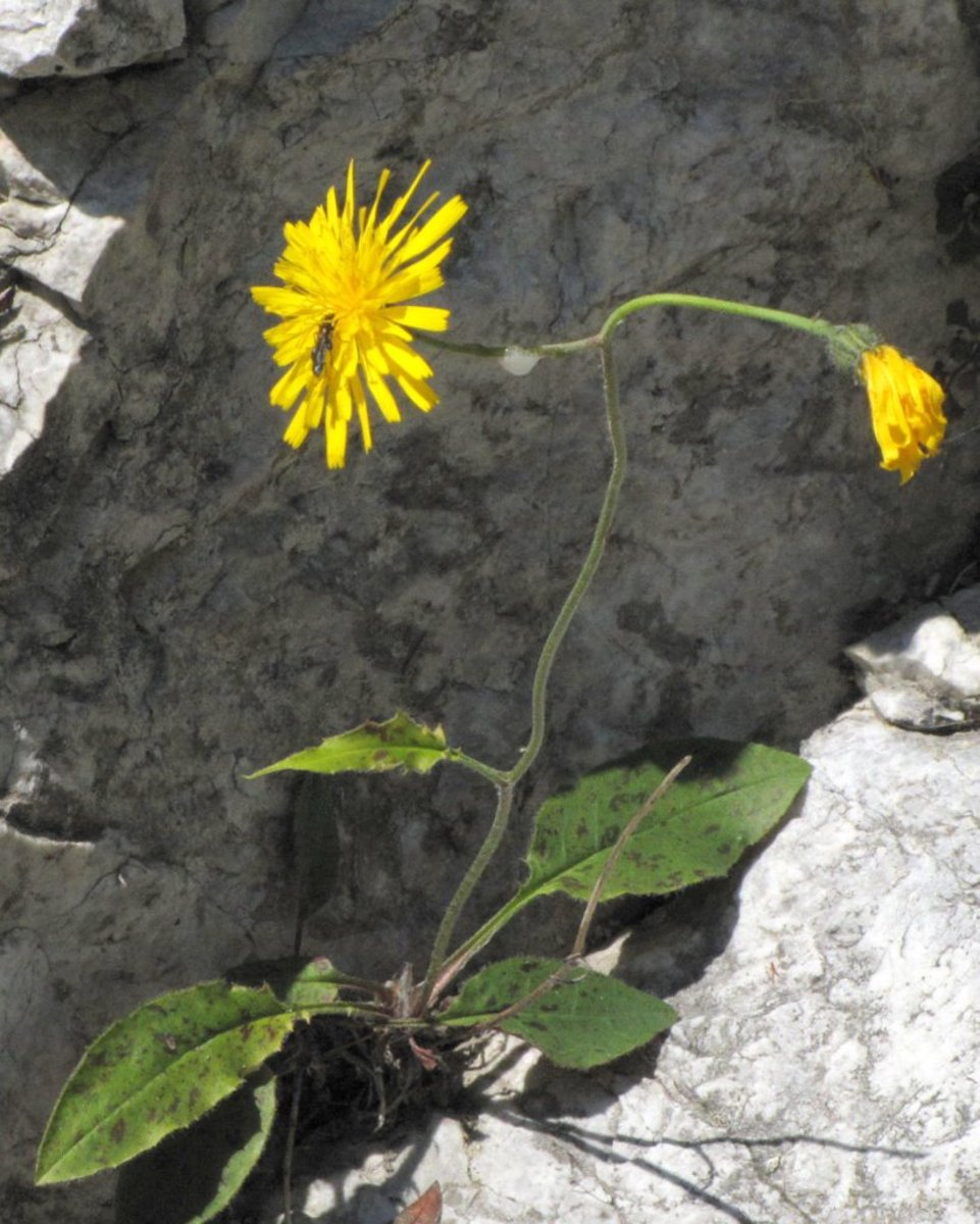 Razcepljena škržolica na sev. pobočju Kamniškega vrha.